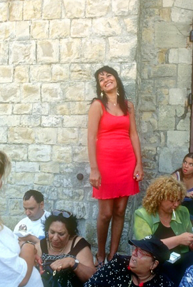 La Sardinha aux Saintes-Maries-de-la-Mer lors du pèlerinage gitan